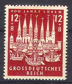 Briefmarke Deutsches Reich 1943 Michel #862 800 Jahre Lübeck mit dem Motiv der Altstadt Sieben Türme